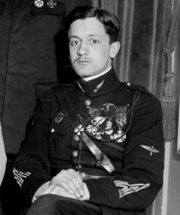 Georges Guynemer. Détail d'une photographie prise pour l'Aéro-club de France avec un groupe d'officiers, probablement pilotes de guerre comme lui.